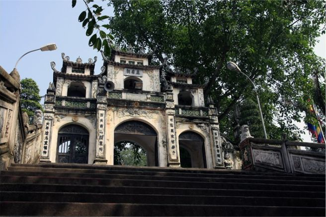 Tam quan đền Bà Chúa Kho, Bắc Ninh.